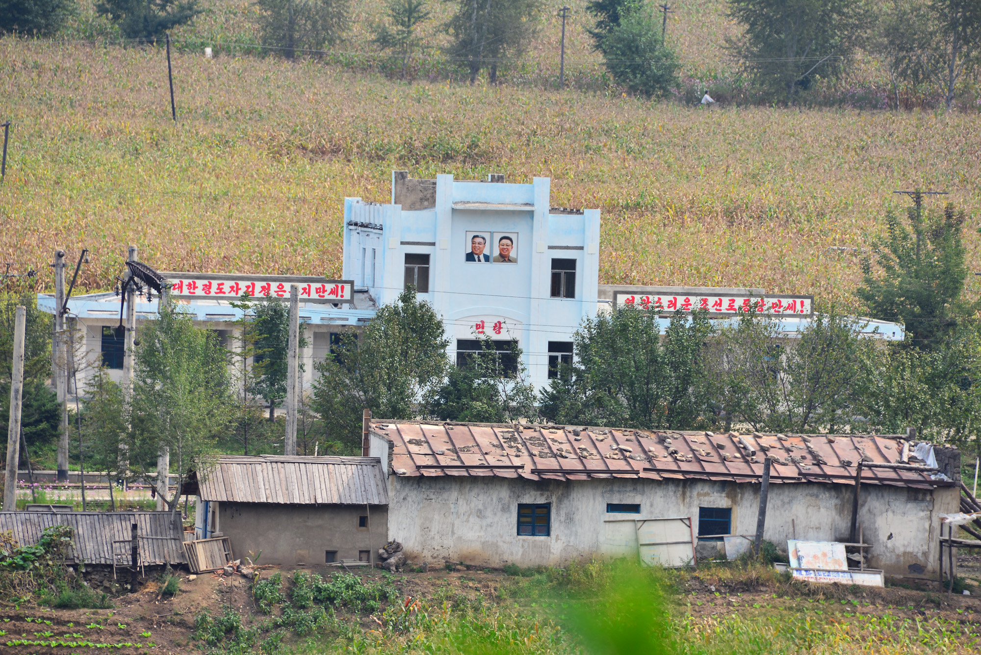 两江道珉汤站